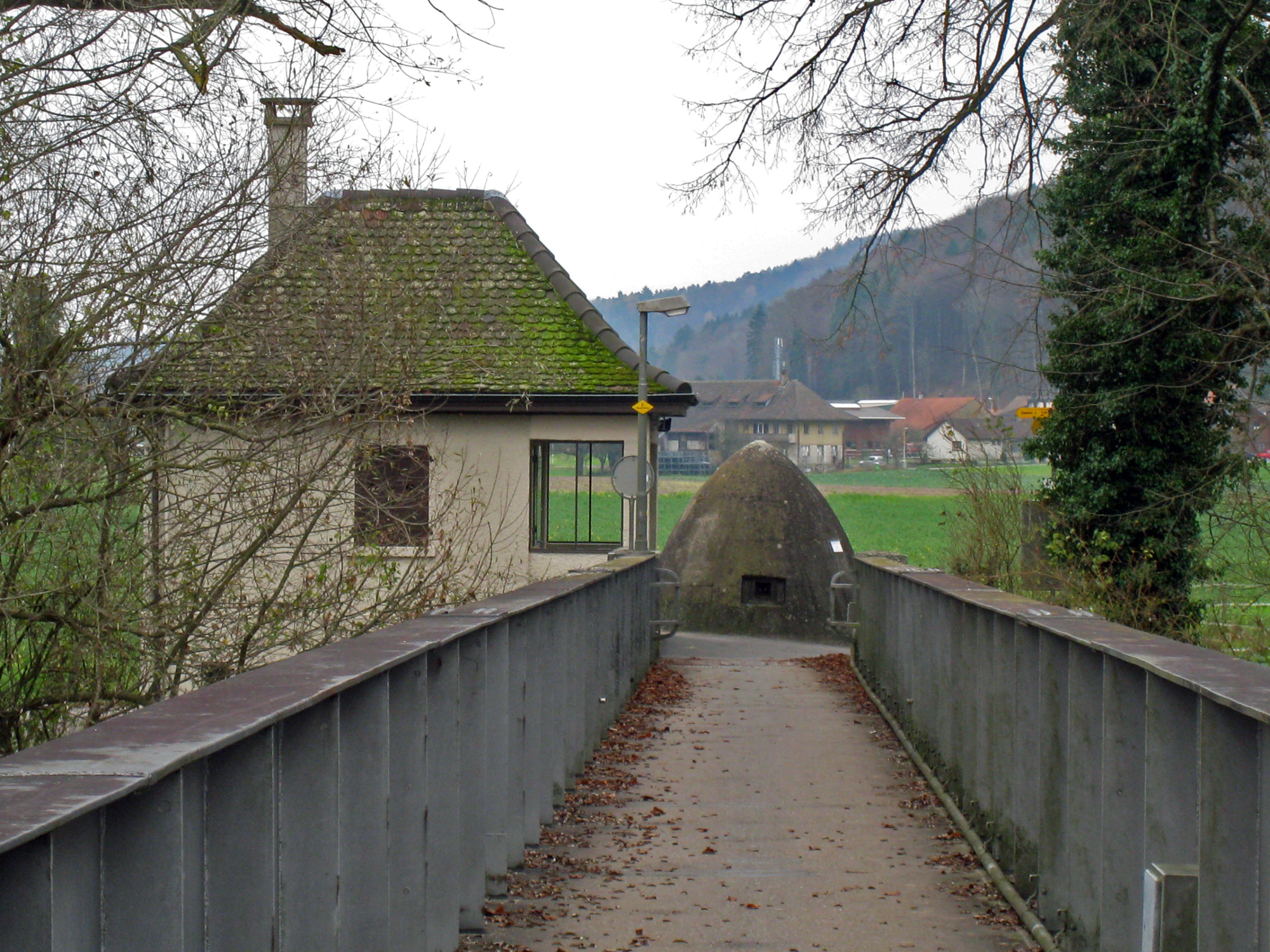 Zollhaus und Leichtstand A 4302 in Schwaderloch, Kanton Aargau